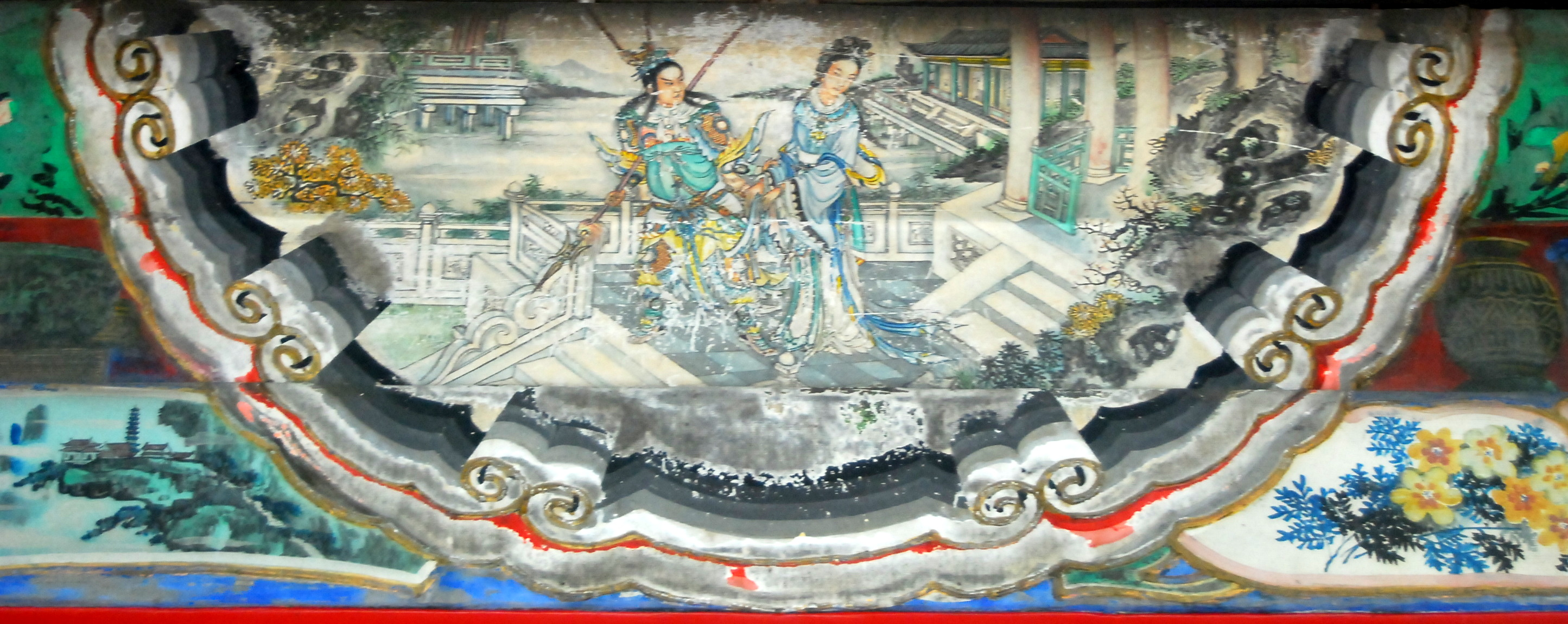 颐和园长廊上的彩绘：吕布戏貂蝉